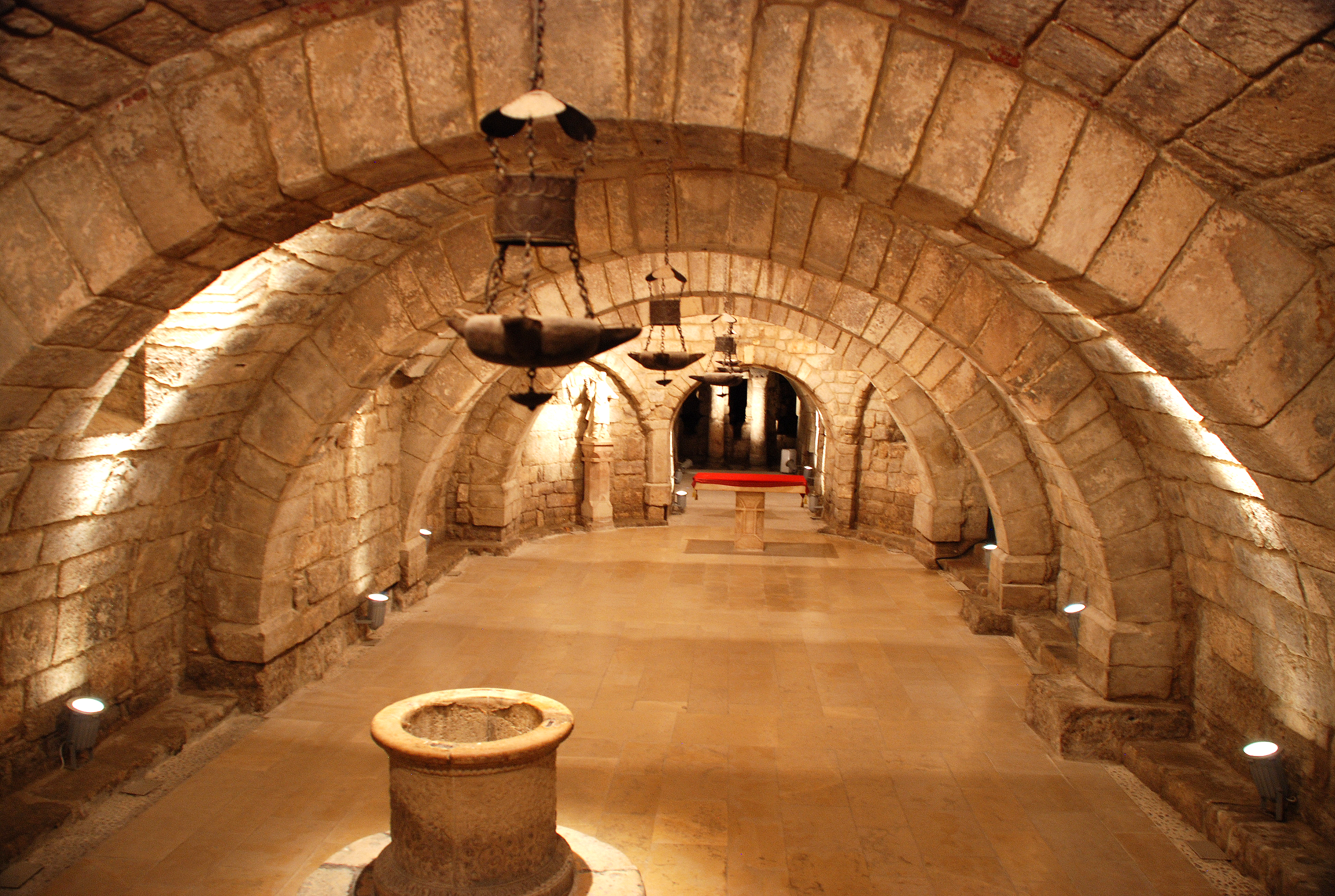 Catedral de Palencia, Cripta de San Antolín, Palencia (España), prerrománica s XI.